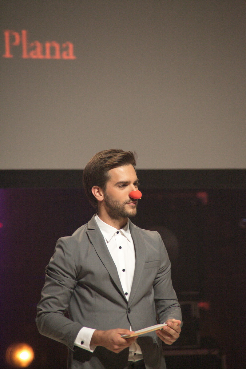 Lliurament dels Premis Nacionals de Cultura de Catalunya 2014. Santa Coloma de Gramenet, 2 de juny de 2014